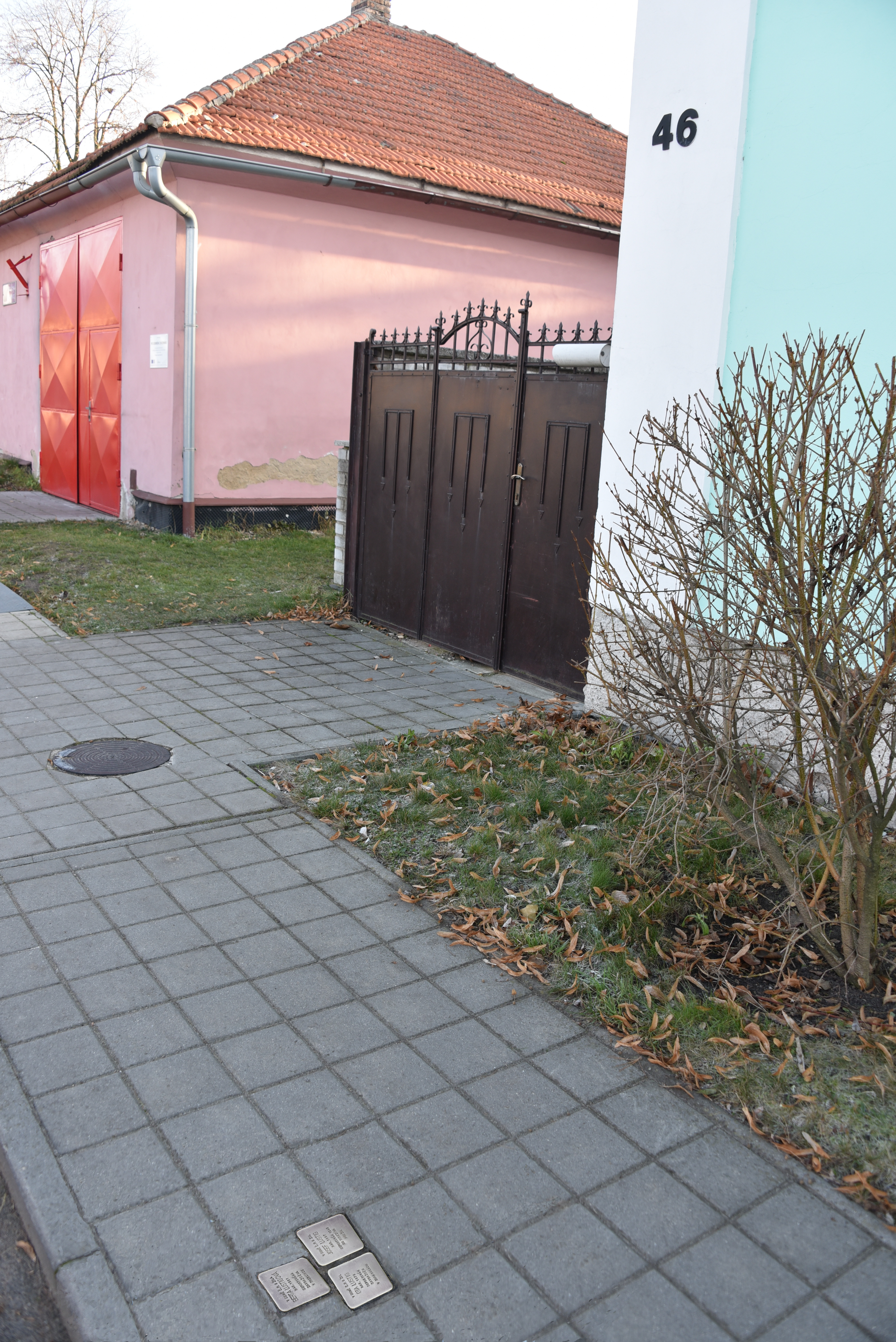 Stolpersteine in Ratenice, gegenüber dem Haus, in dem die Familie Lustig wohnte.